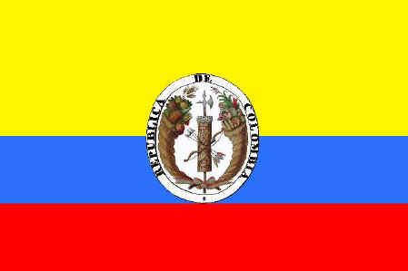 bandera de la gran colombia